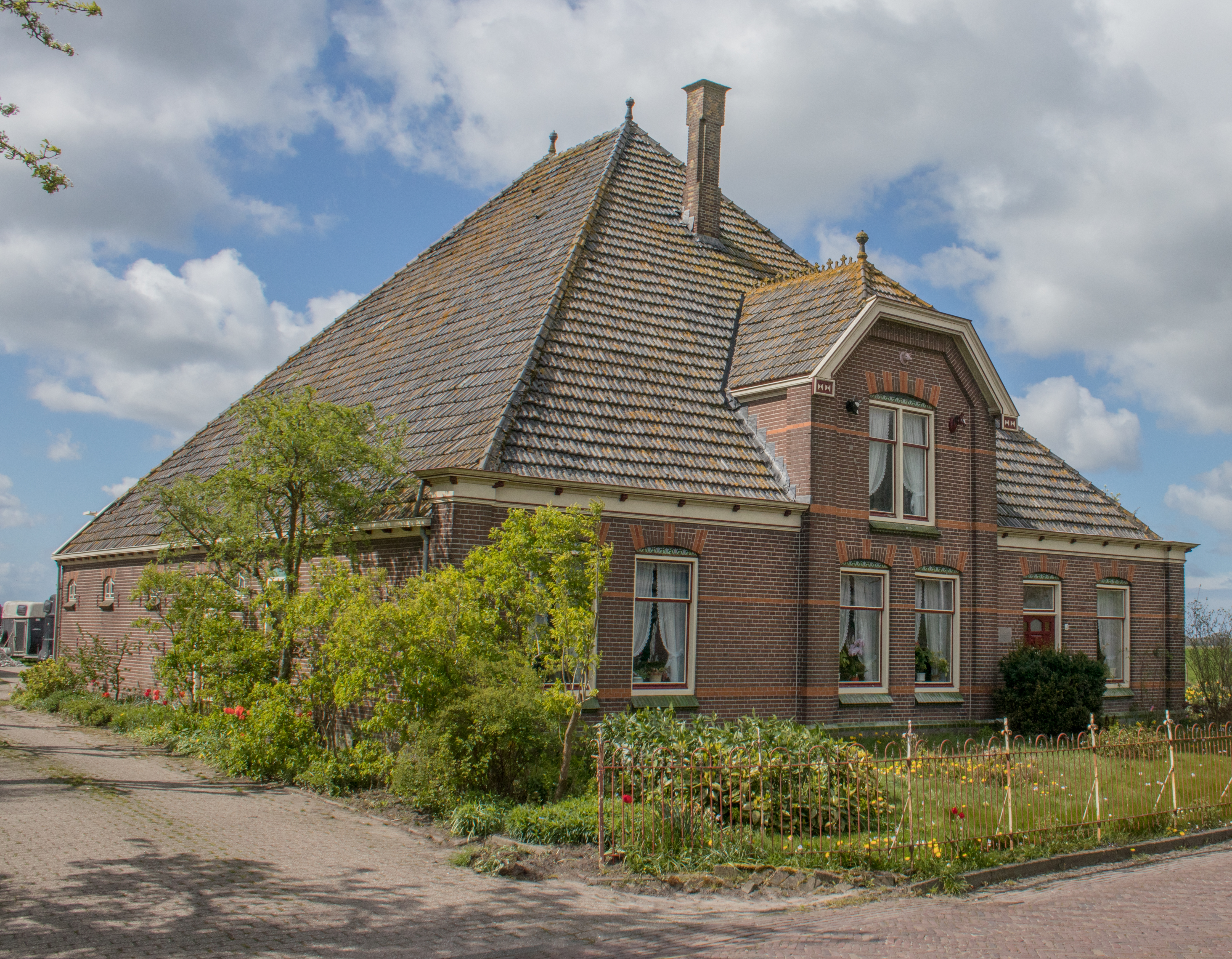 Stolpboerderij uit 1913 met bijbehorend hek. Het geheel is rijksmonument